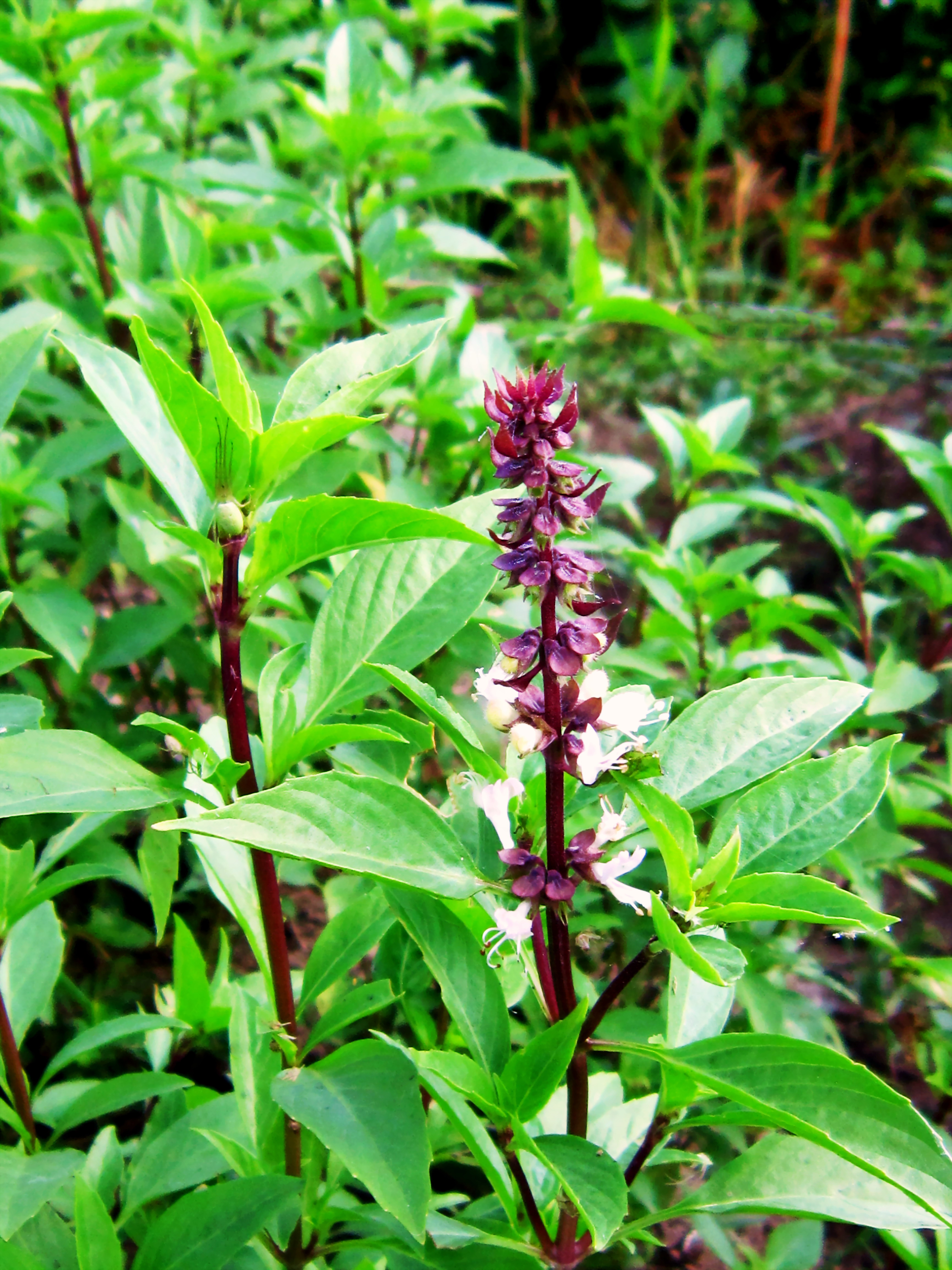 Húng quế (tên khoa học: Ocimum basilicum) ở miền Nam Việt Nam, đang trổ hoa.